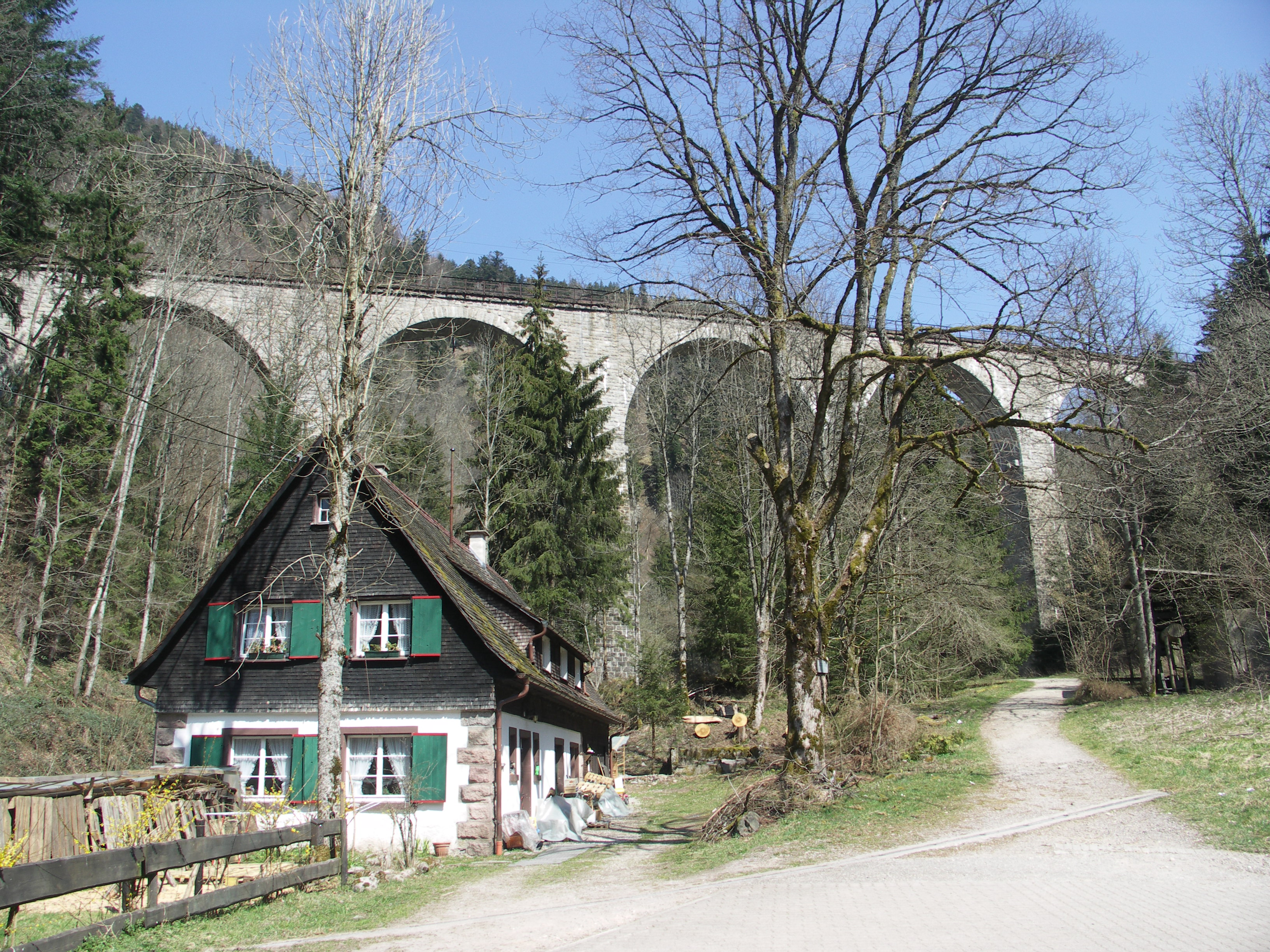 Eisenbahnviadukt über die Ravennaschlucht, Schwarzwald